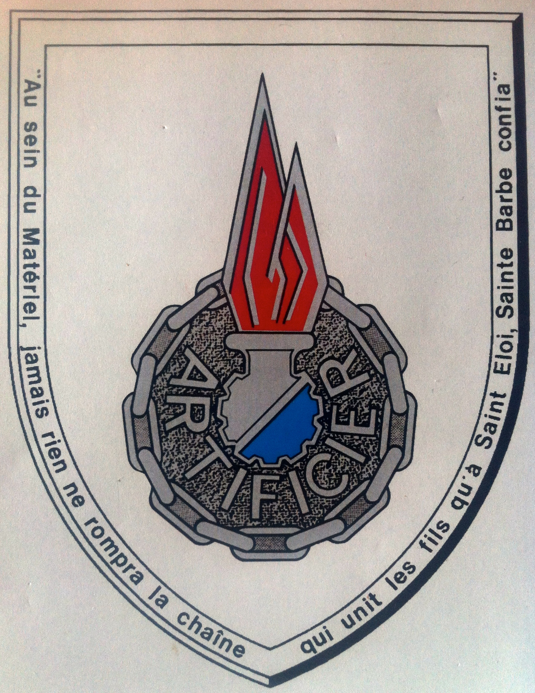 Insigne de tradition des artificiers du SIMu.